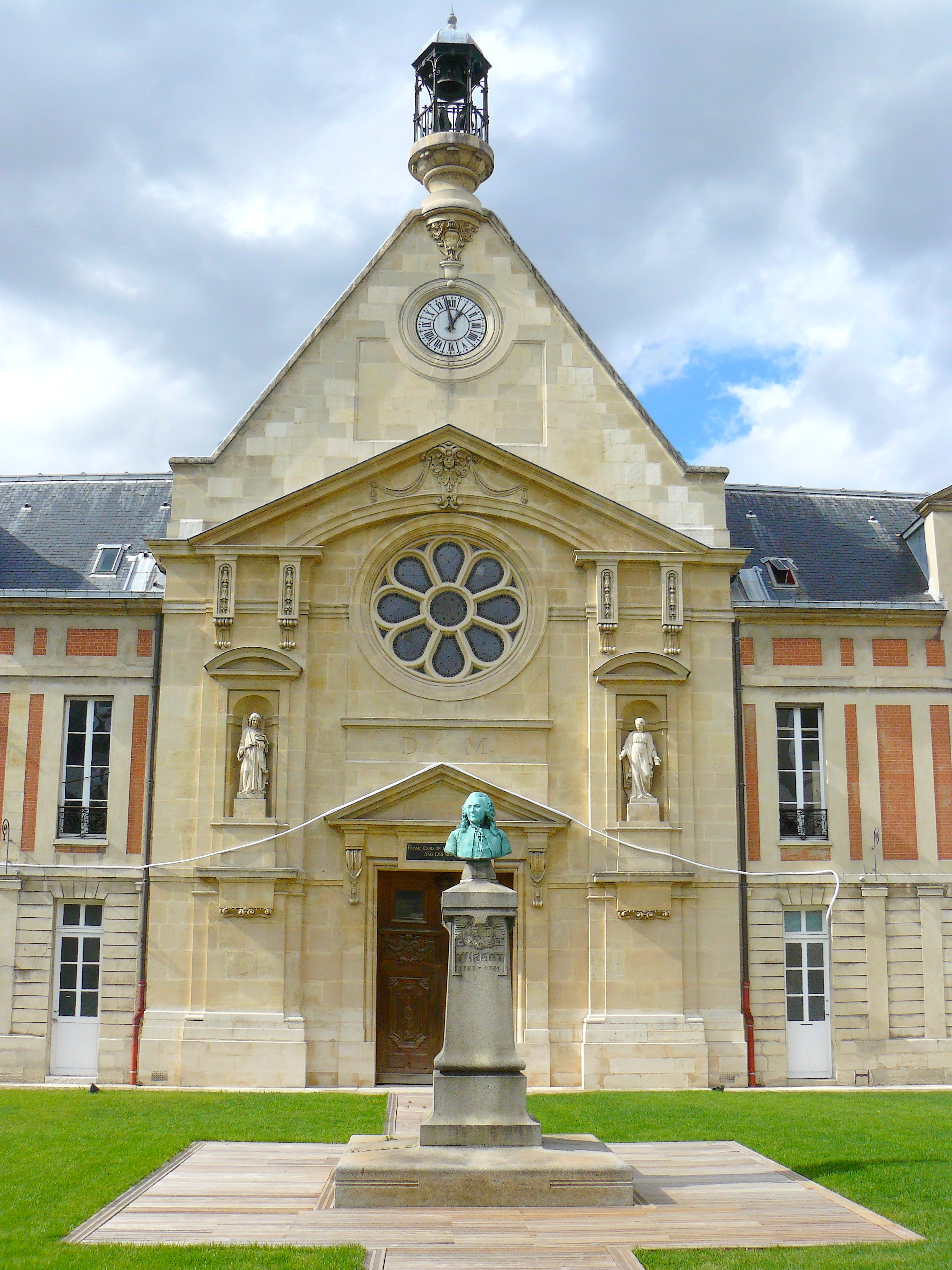 Chapelle de l'ancien hôpital Laennec à Paris (VIIe arrd.) - Fermé depuis 2000, il va faire l'objet d'un grand programme urbanistique Paris 7 - Chapelle classée, buste de Turgot.